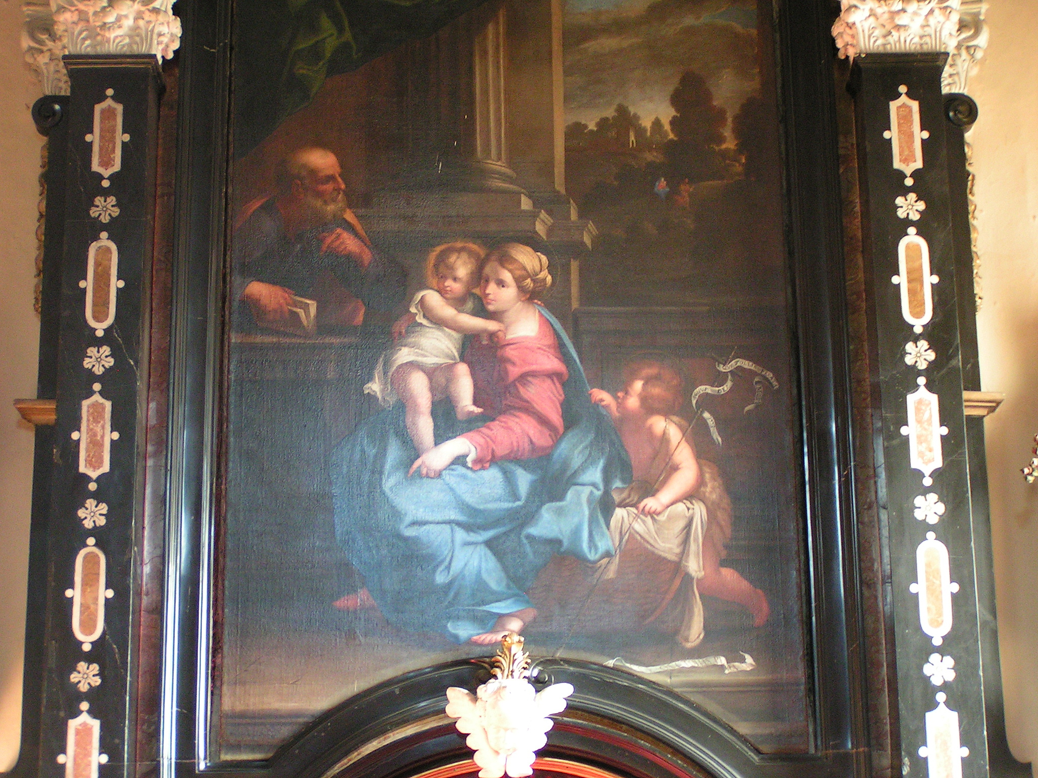 Quadro di Antonio Busca (1625-1684) nella chiesa di Magliaso Foto scattata dall'utente Elvezio